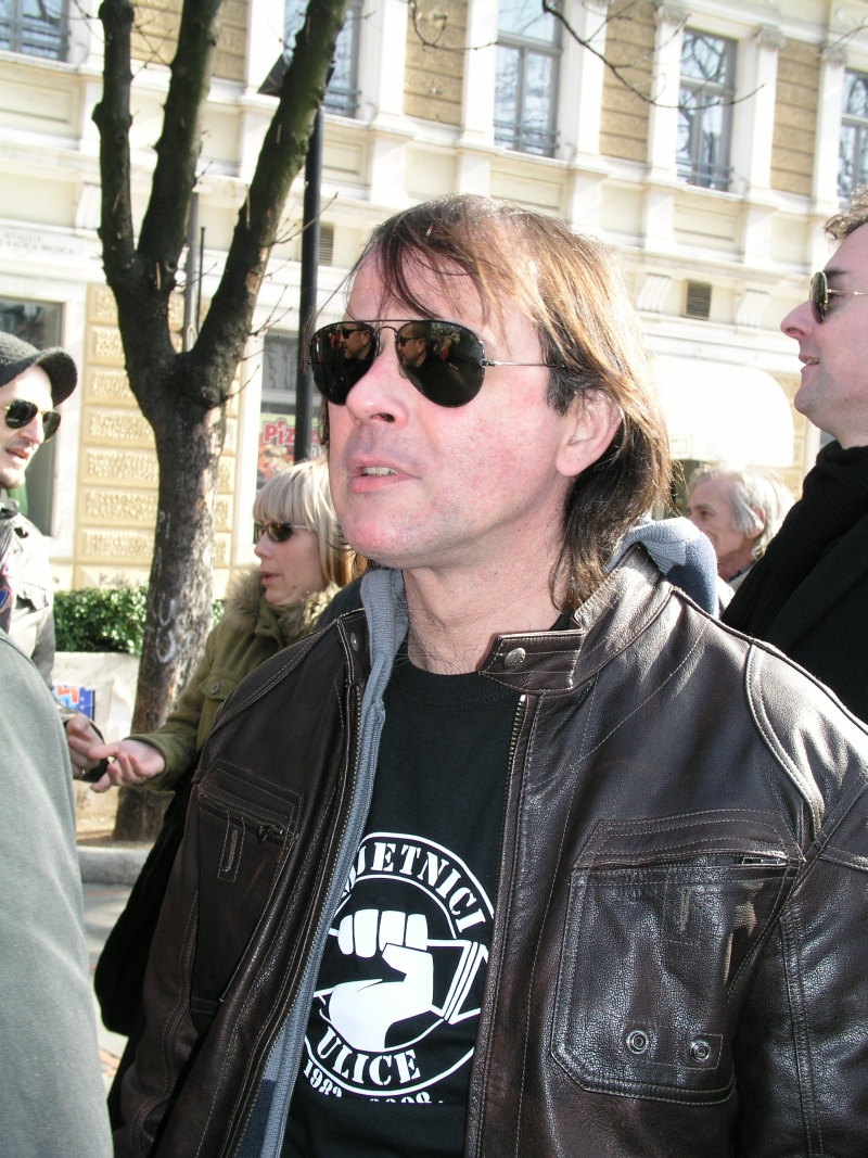 "Riječki novi val" ispred Konta u Rijeci, Zoran Prodanović Prlja, Hrvatska